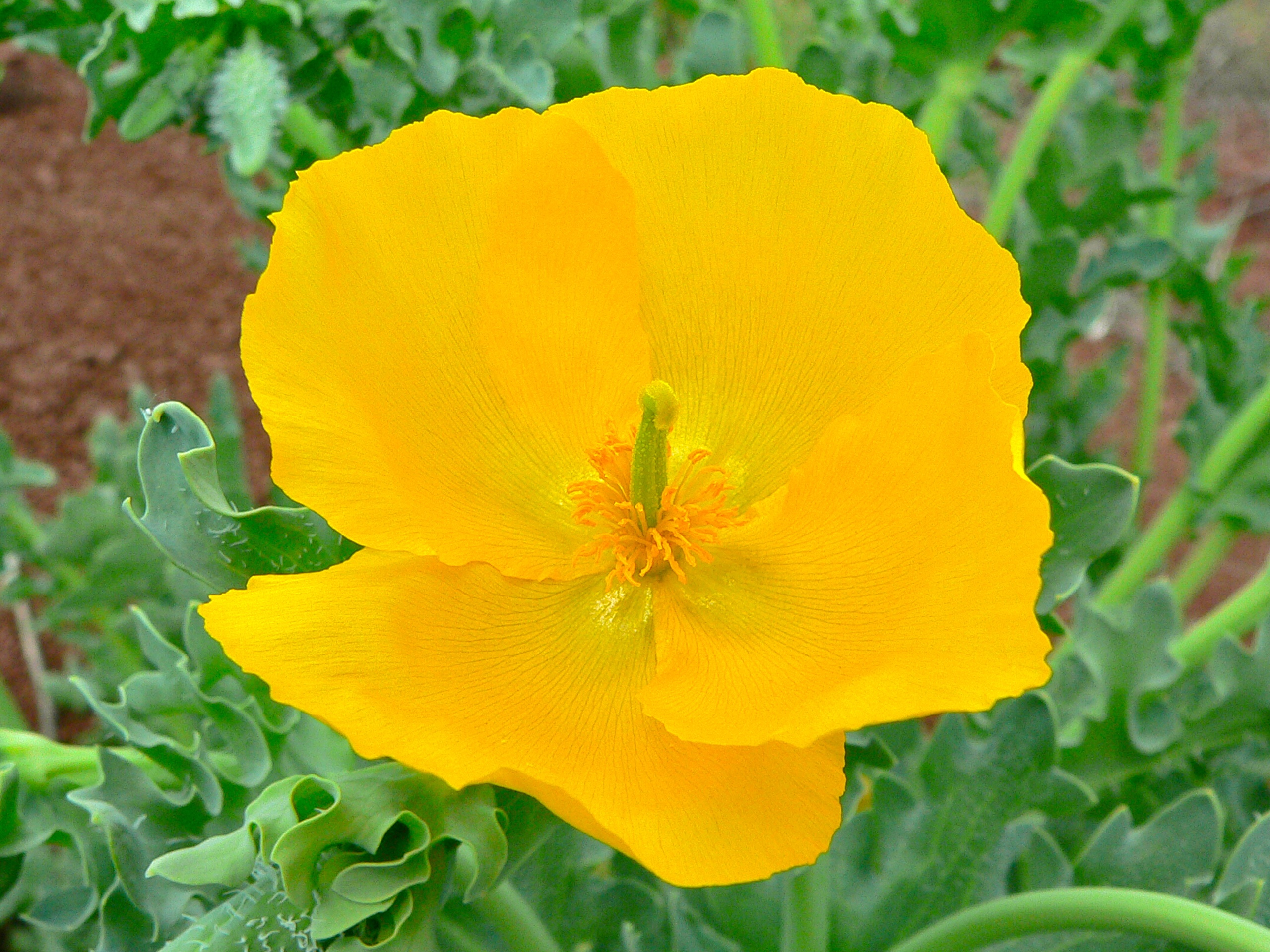 Octon, Hérault, FRANCE